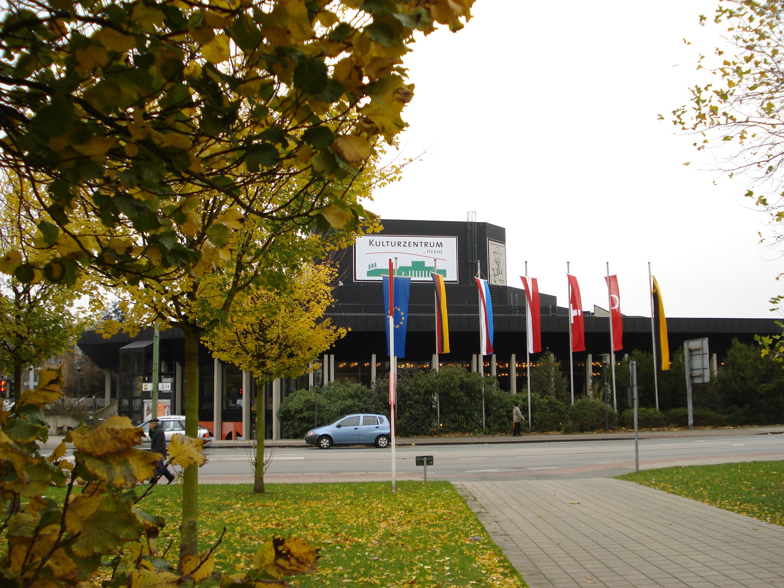 Das Kulturzentrum in Herne mit internationalem Flaggenschmuck der Gäste (Deutschland, Niederlande, Österreich und Schweiz) sowie des Hausmeisters (Türkei) während der Tage alter Musik 2008